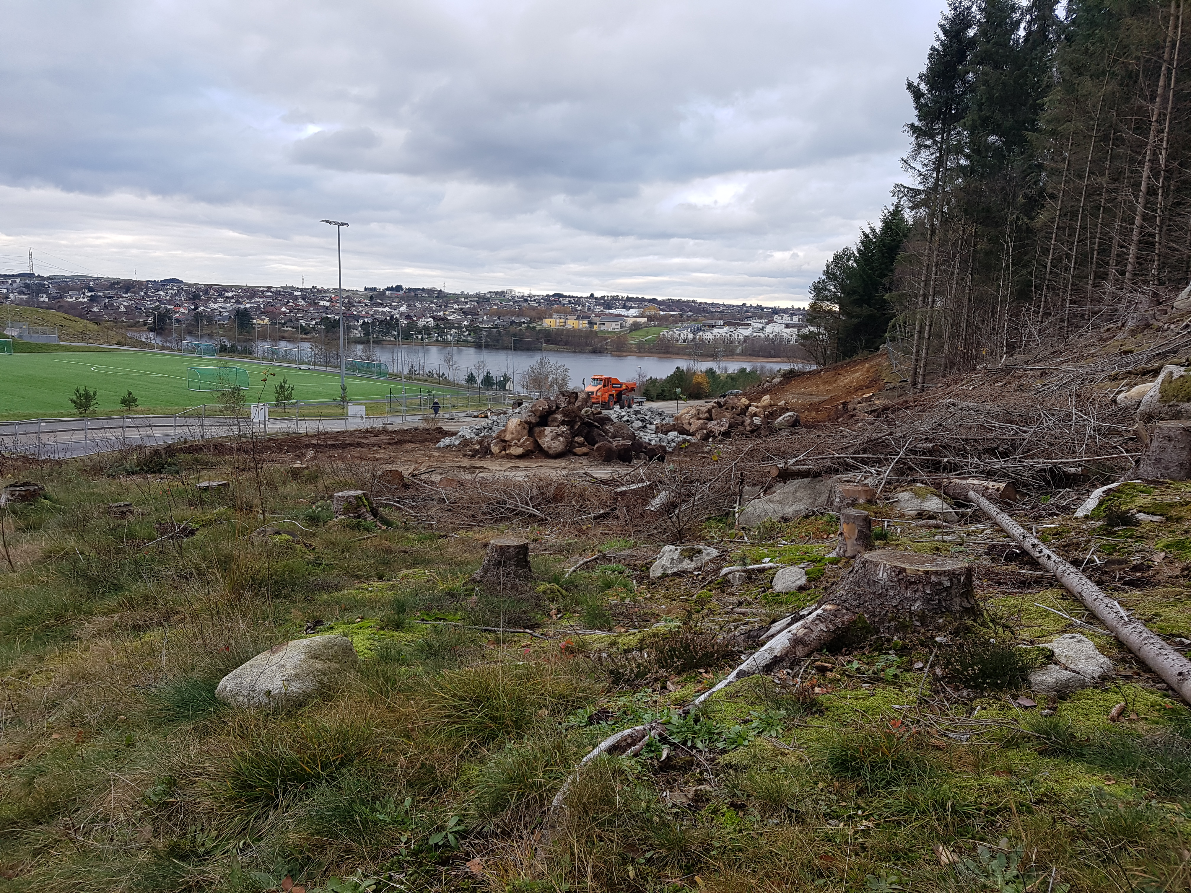 Her skal det bygges ny parkering, som erstatning for den som forsvinner